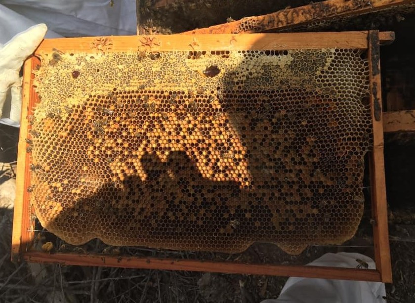 Bastidor o marco con polen y miel del género Apis mellifera en el estado de Jalisco.